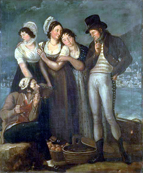 Trachtenbild. Fünfteilige Figurengruppe in einem Ruderboot auf dem Zürichsee. Öl auf Leinwand. 70.5 cm x 58.7 cm